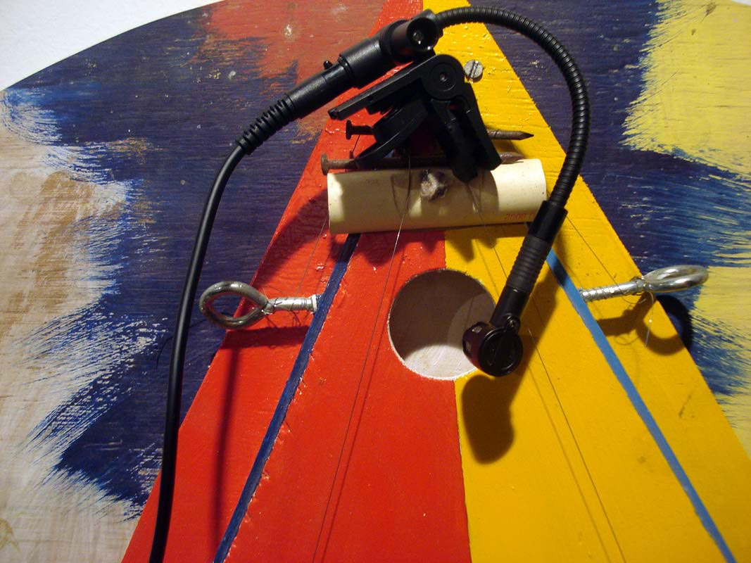 Obra interativa de Chico Machado. O artista está na foto. Museu do Trabalho, Porto Alegre.